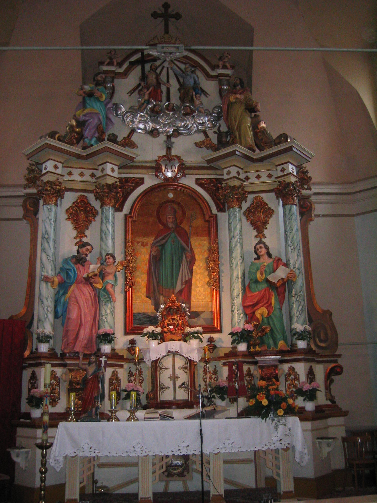 Kotla - ołtarz św. Krzyża w kościele parafialnym pw. świętego Marcina